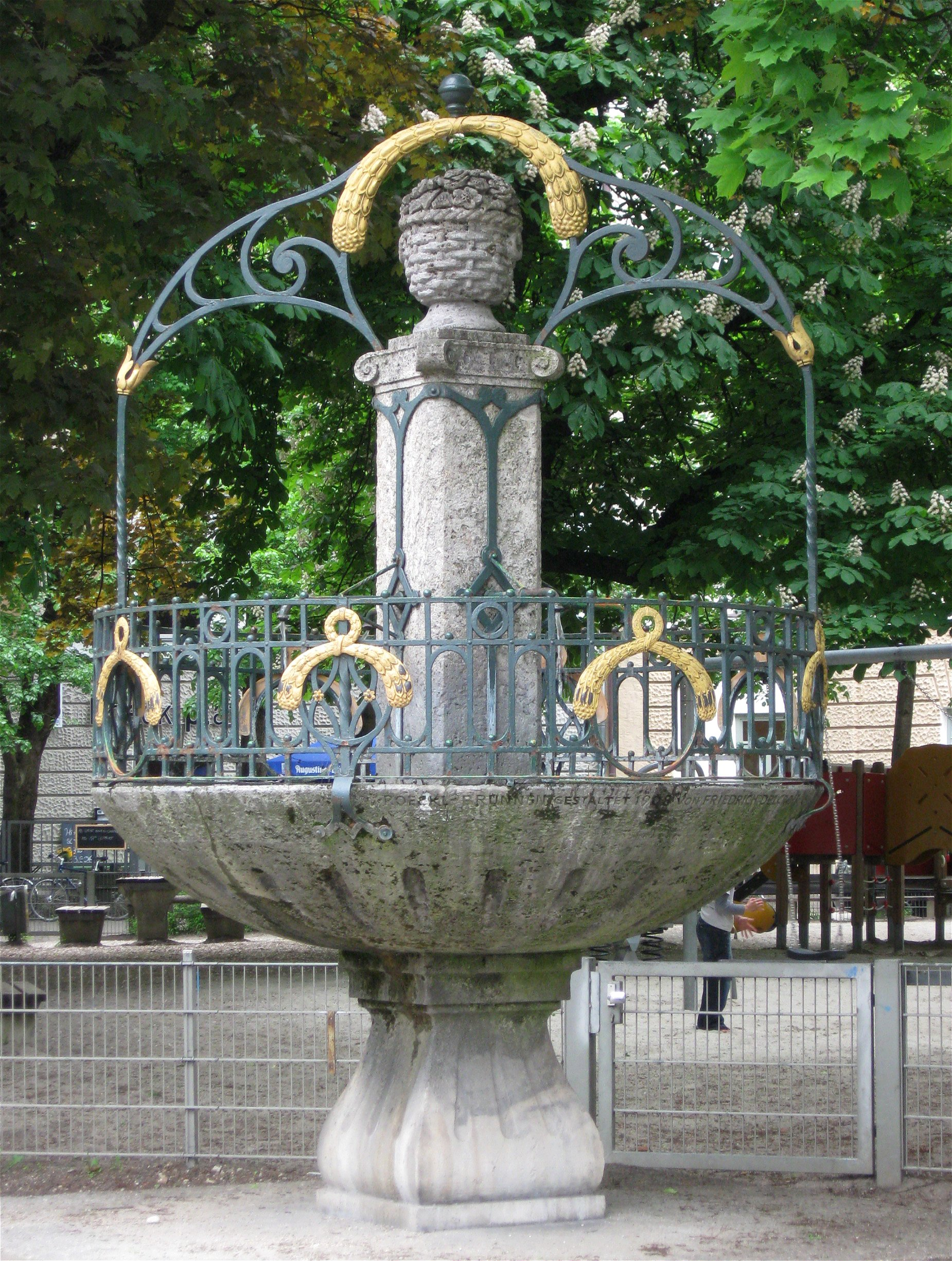 Roecklplatz; Roeckl-Brunnen, Jugendstil, Schale mit Pfeiler und Gitteraufbau, 1908 von Friedrich Delcroix; in der dreieckigen Anlage in Platzmitte.